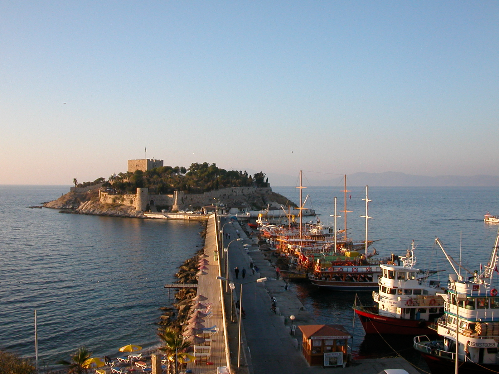 Die Vogelinsel in Kusadasi.